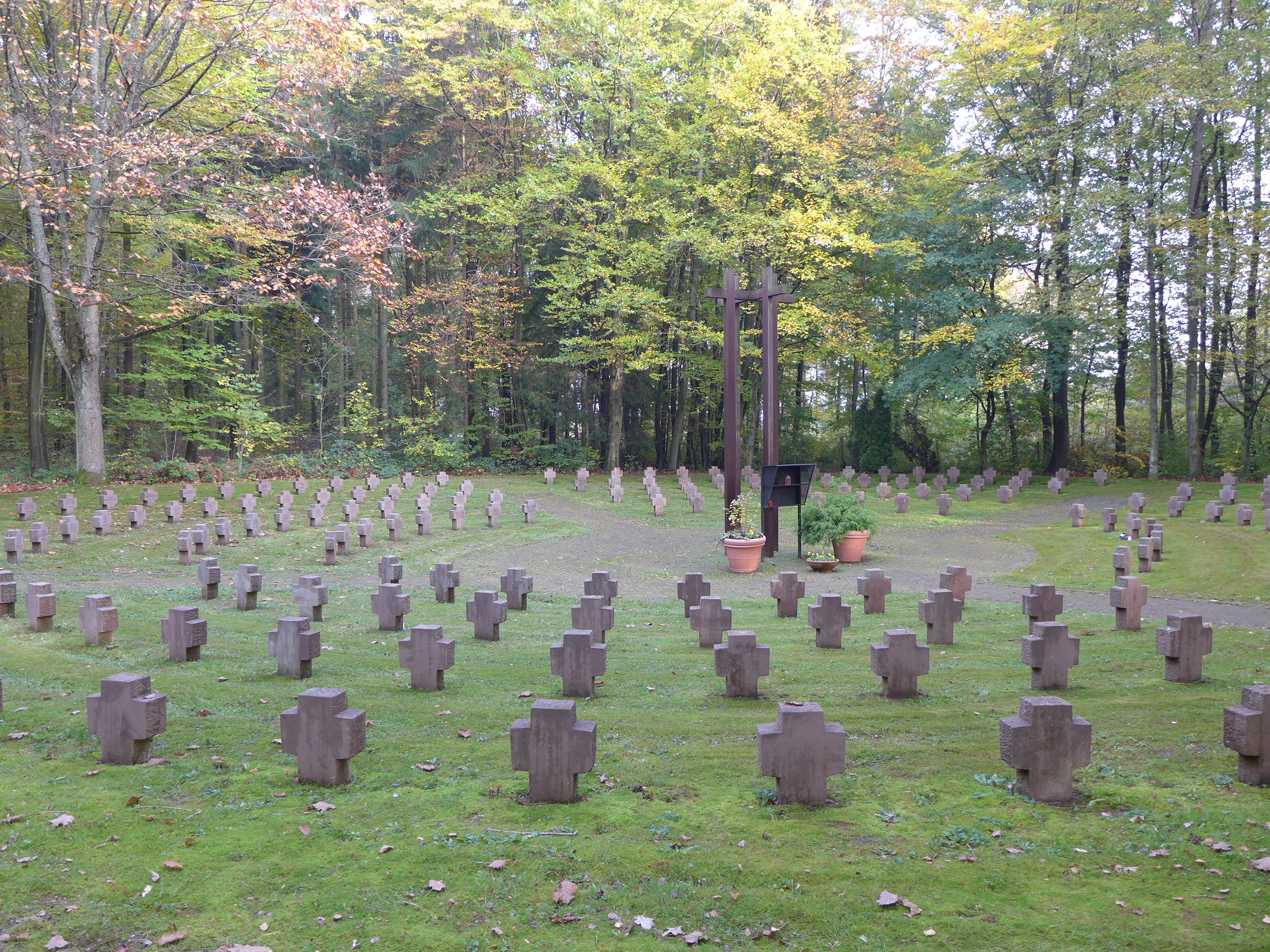 Dillingen/Saar, Ehrenfriedhof für im Zweiten Weltkrieg getötete Soldaten auf dem Waldfriedhof auf der Pachtener Heide